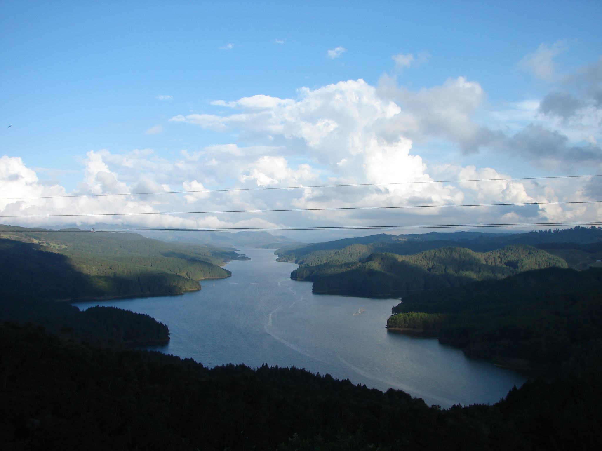 Embalse de San Pedro y Entrerrios. Antioquia, Colombia.